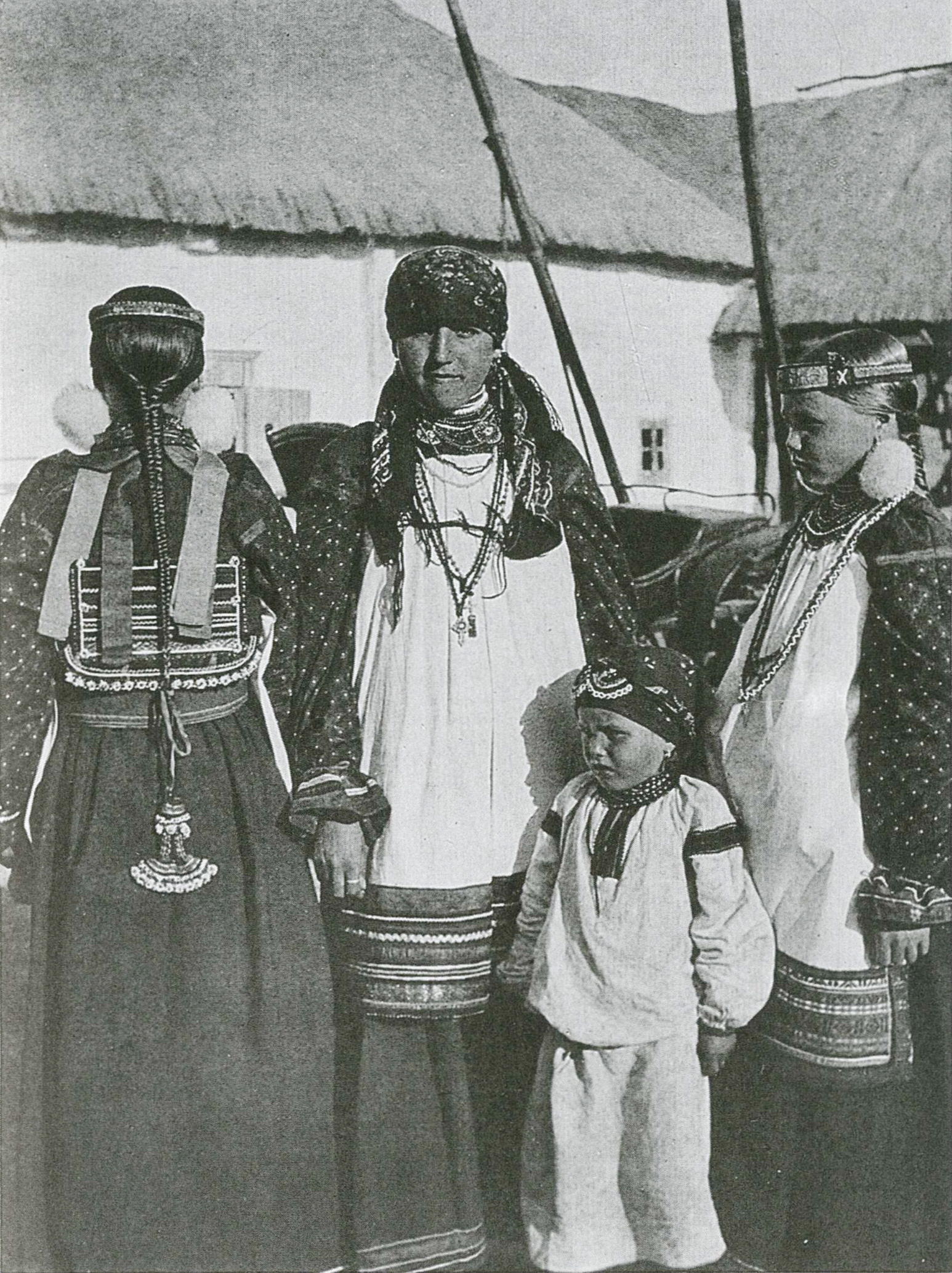 Девушки и девочка в праздничной одежде. Воронежская губерния, 1908. РЭМ. Коллекция 3159-3